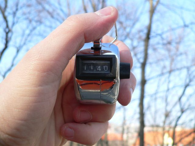 Klikátko